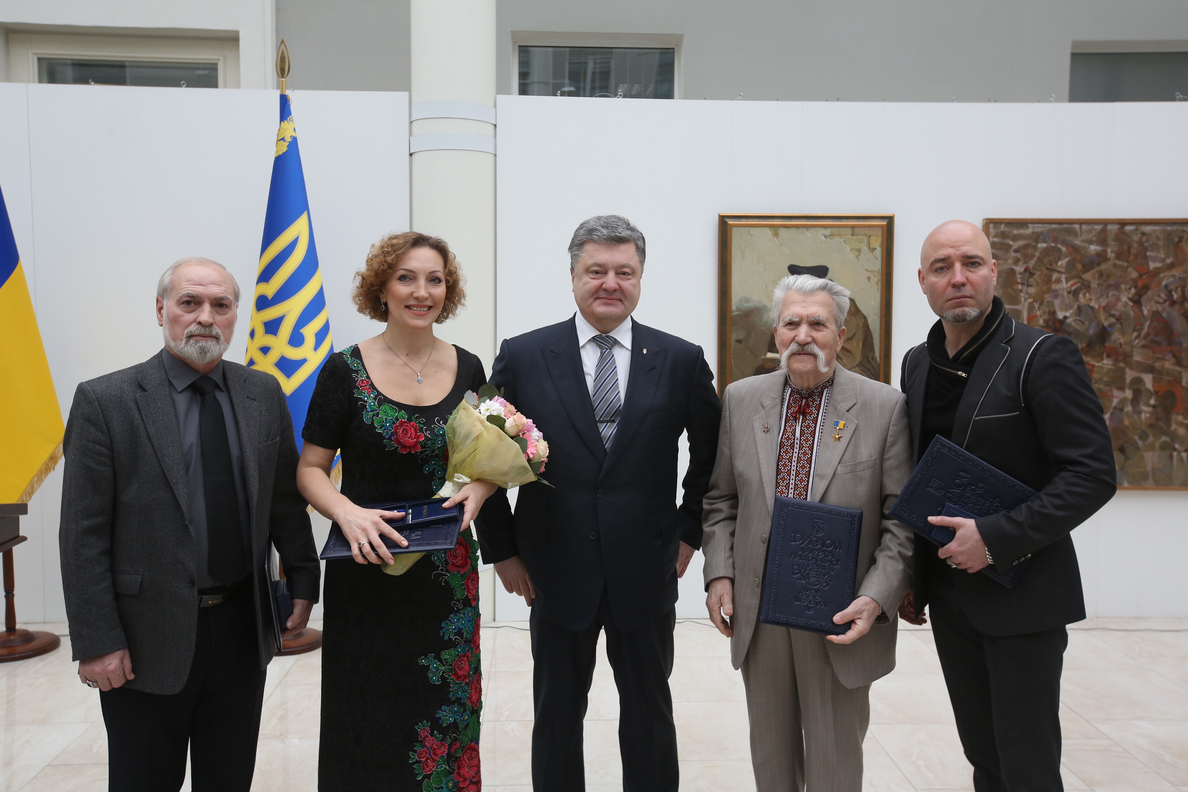 Лауреати Національної премії України імені Тараса Шевченка 2016 року разом з Президентом України Петром Порошенко на церемонії вручення.